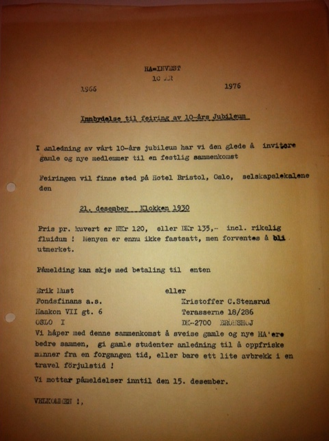 Ha Invest 10 år